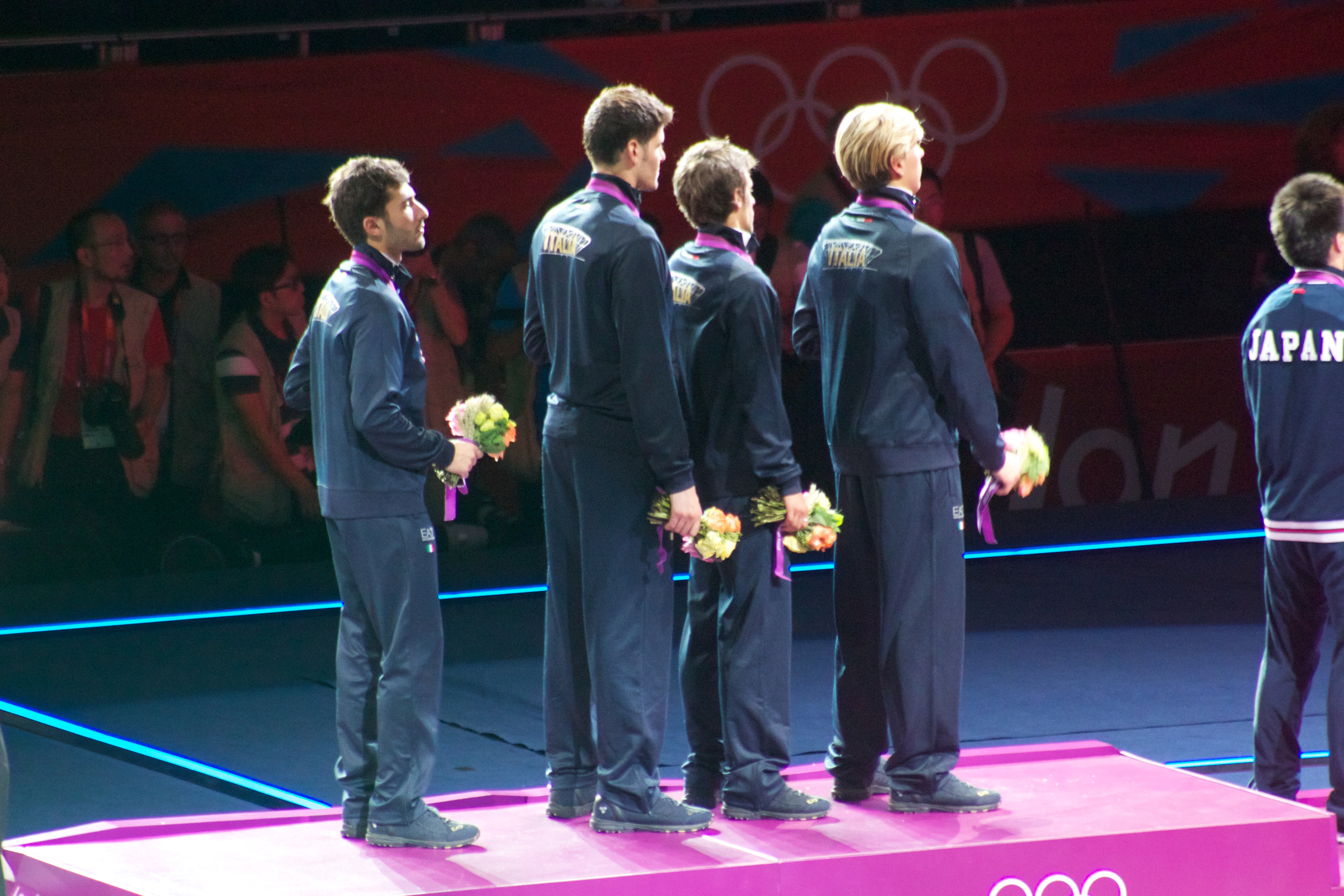 Italy foil team (gold medal): From left Giorgio Avola, Andrea Cassarà, Andrea Baldini, Valerio Aspromonte.